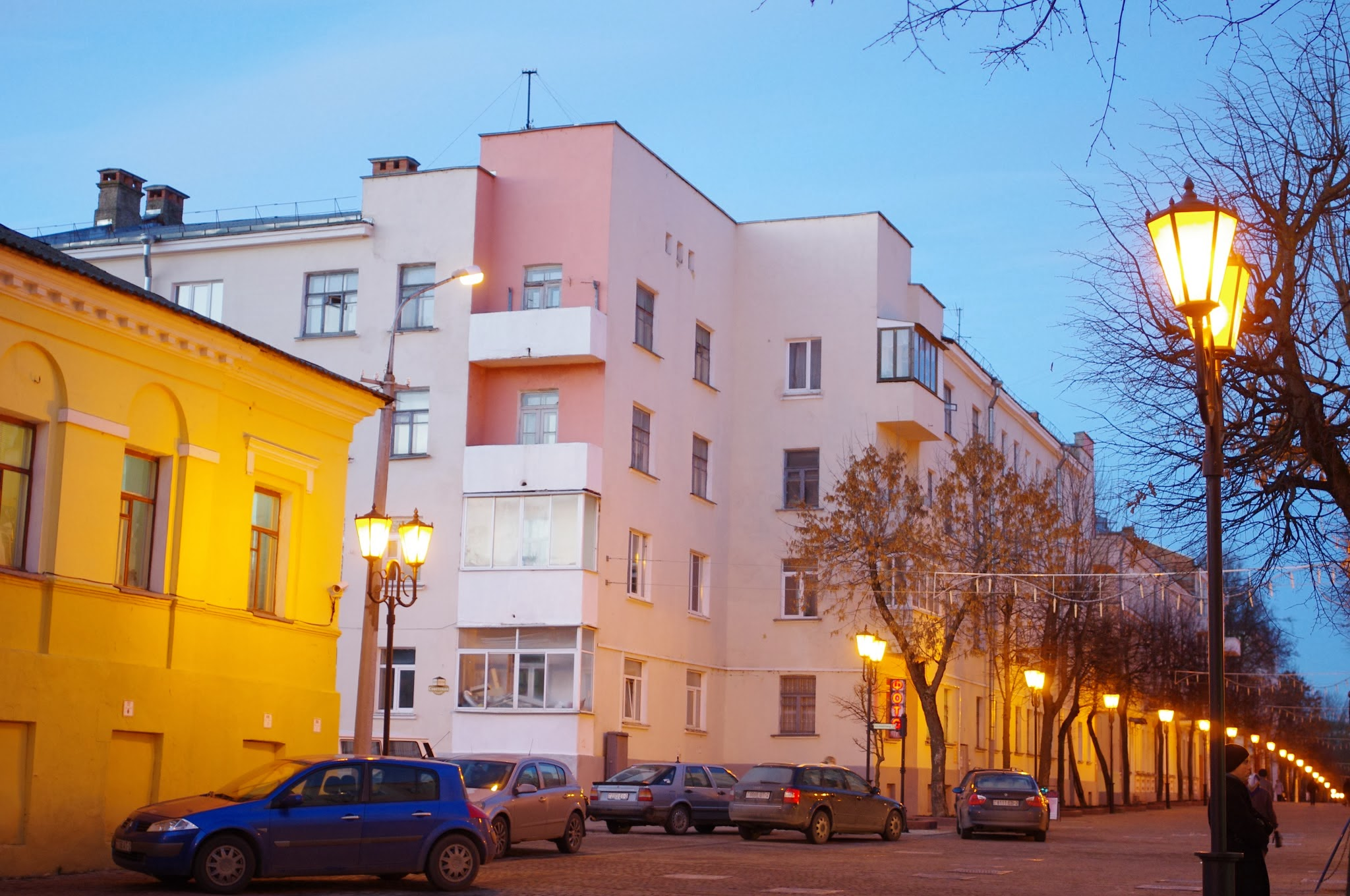 Kastryčnicki rajon, Viciebsk, Belarus